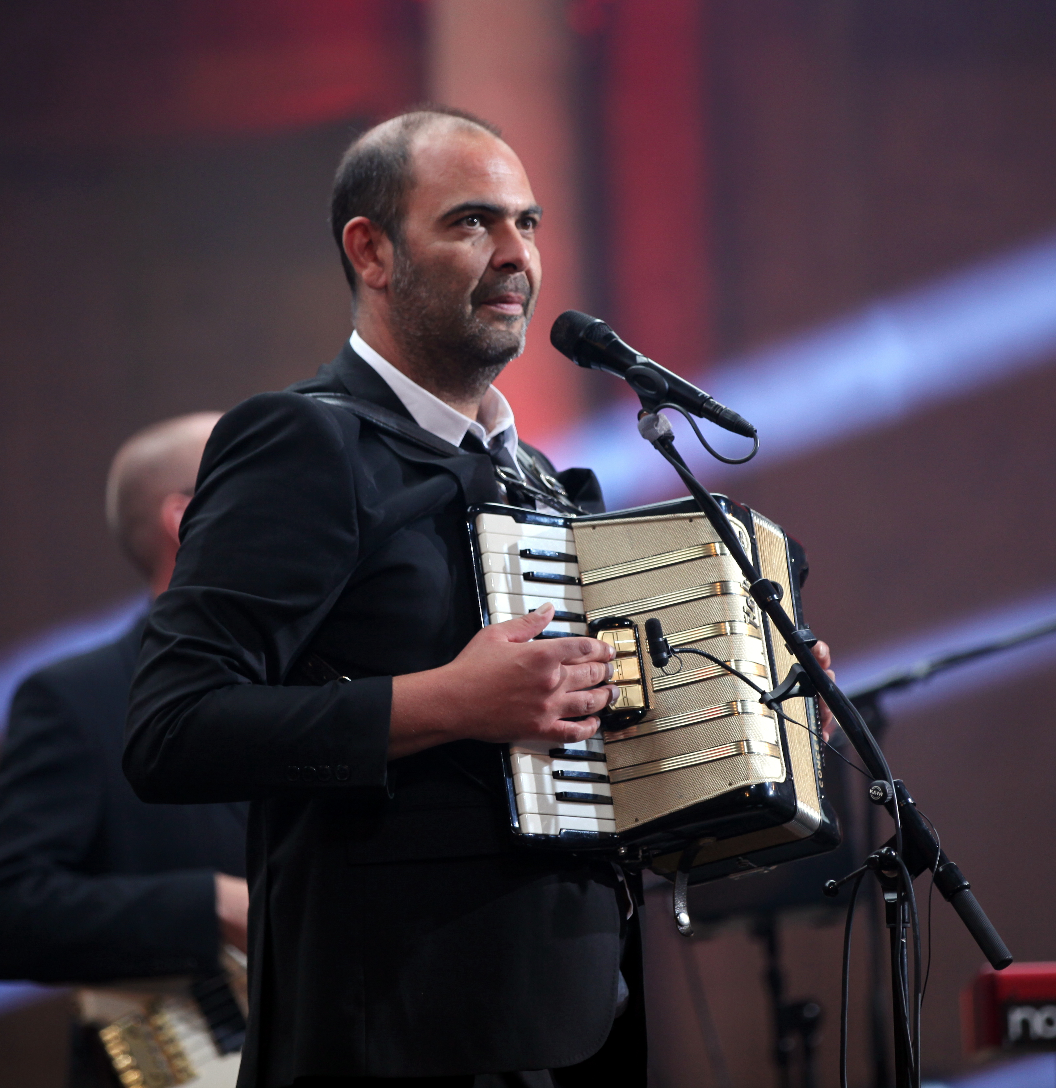 Hannes Ringlstetter mit Begleitmusikern auf dem Heimatsoundfestival 2015 Hannes Ringlstetter